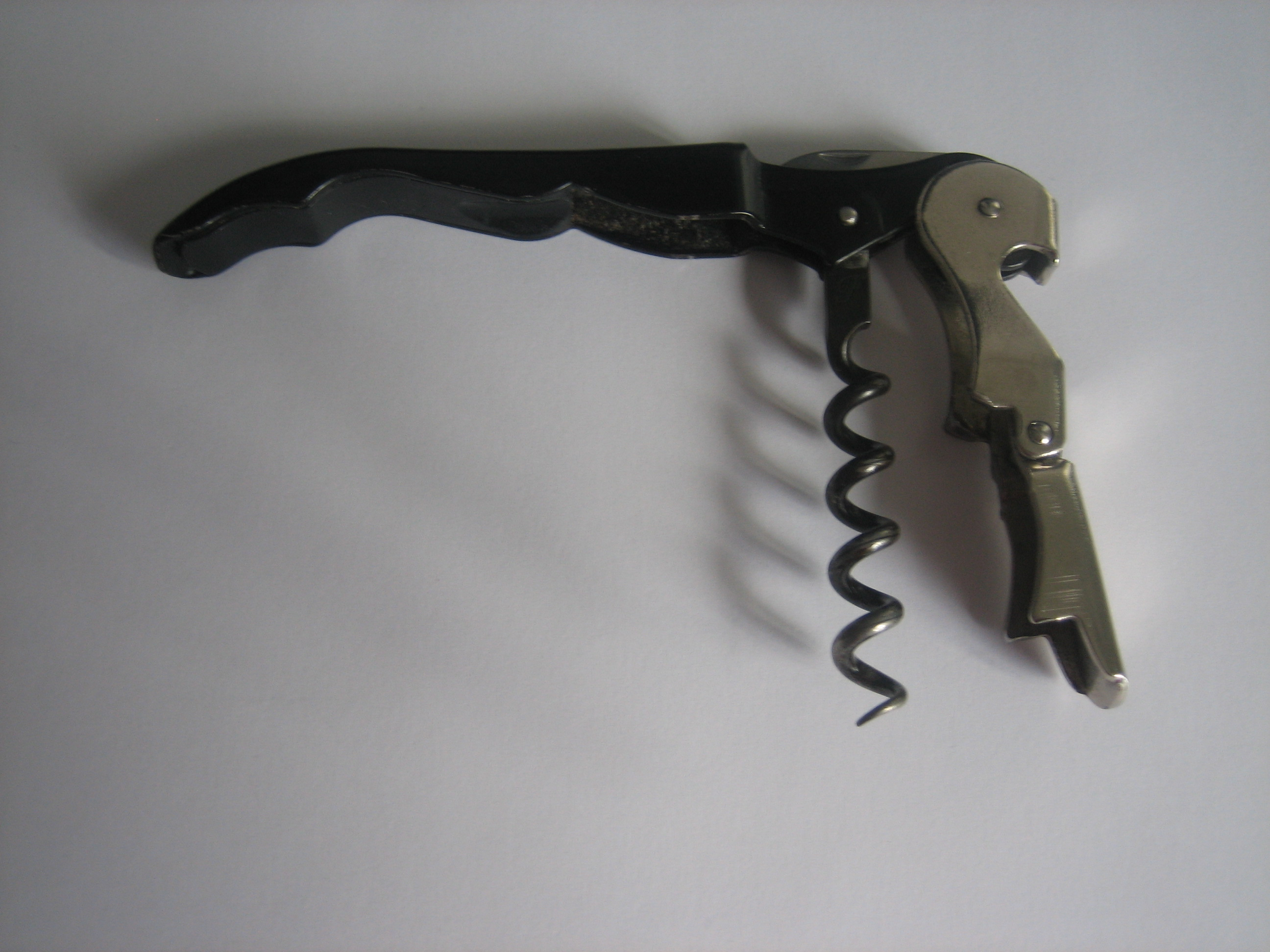 Een klassiek kelnersmes